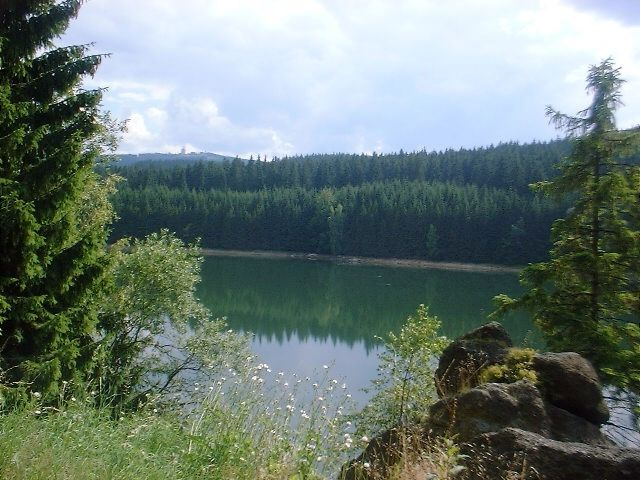 Talsperre Sosa mit dem Auersberg im Hintergrund